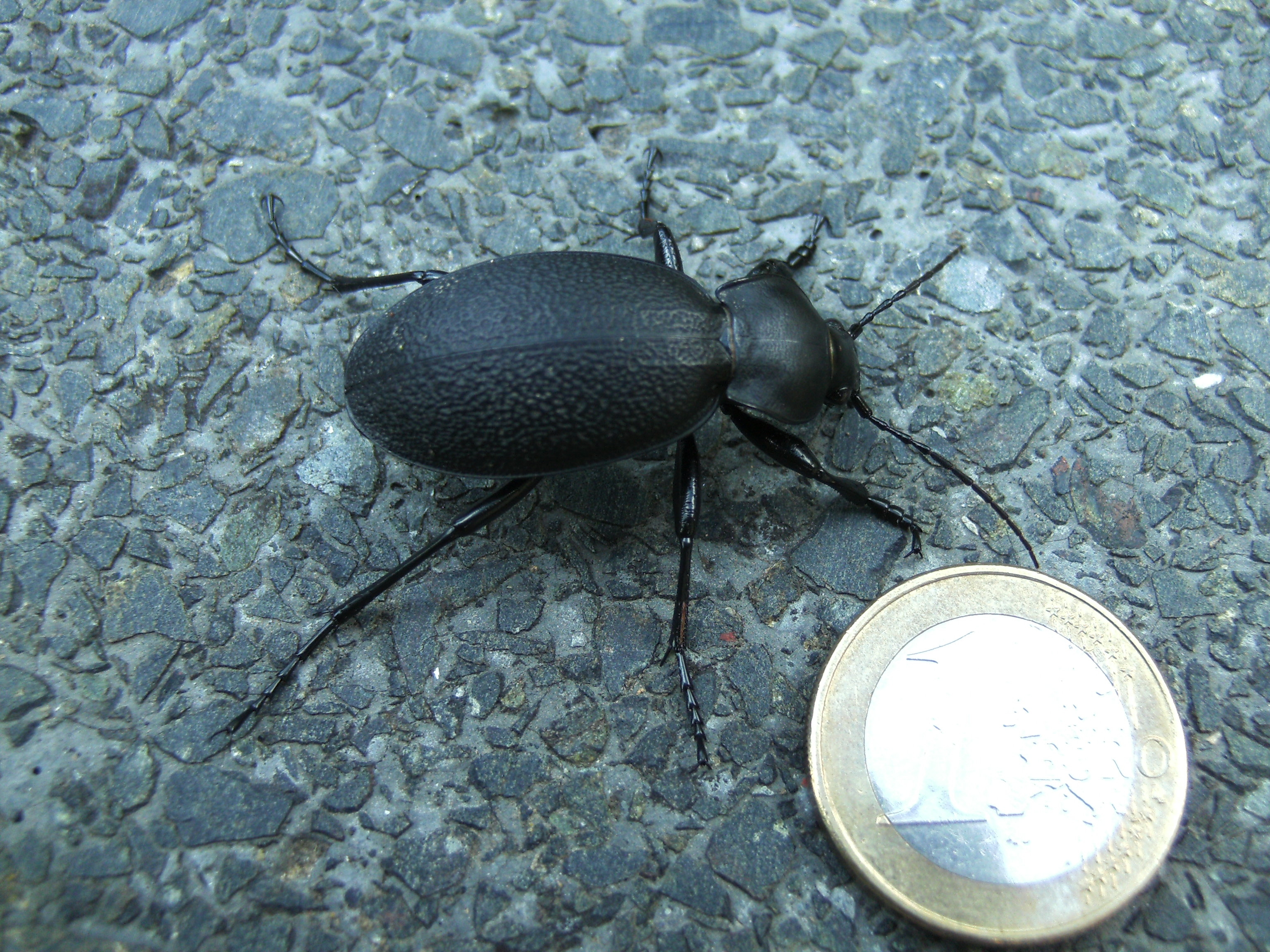 korrekt: Lederlaufkäfer (Carabus coriaceus)